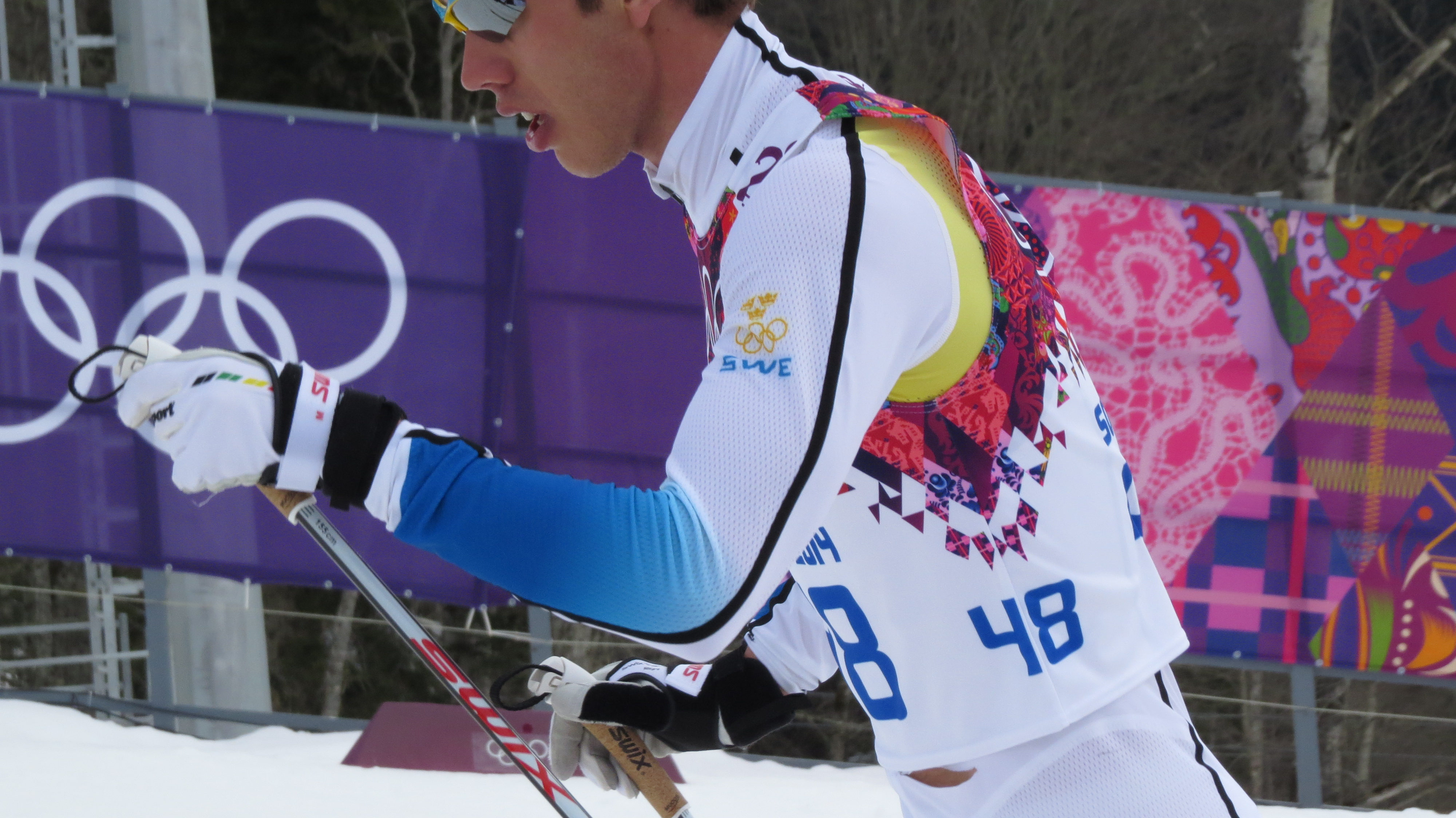 Лыжные гонки на зимних Олимпийских играх 2014 — 15 км классическим стилем (мужчины)